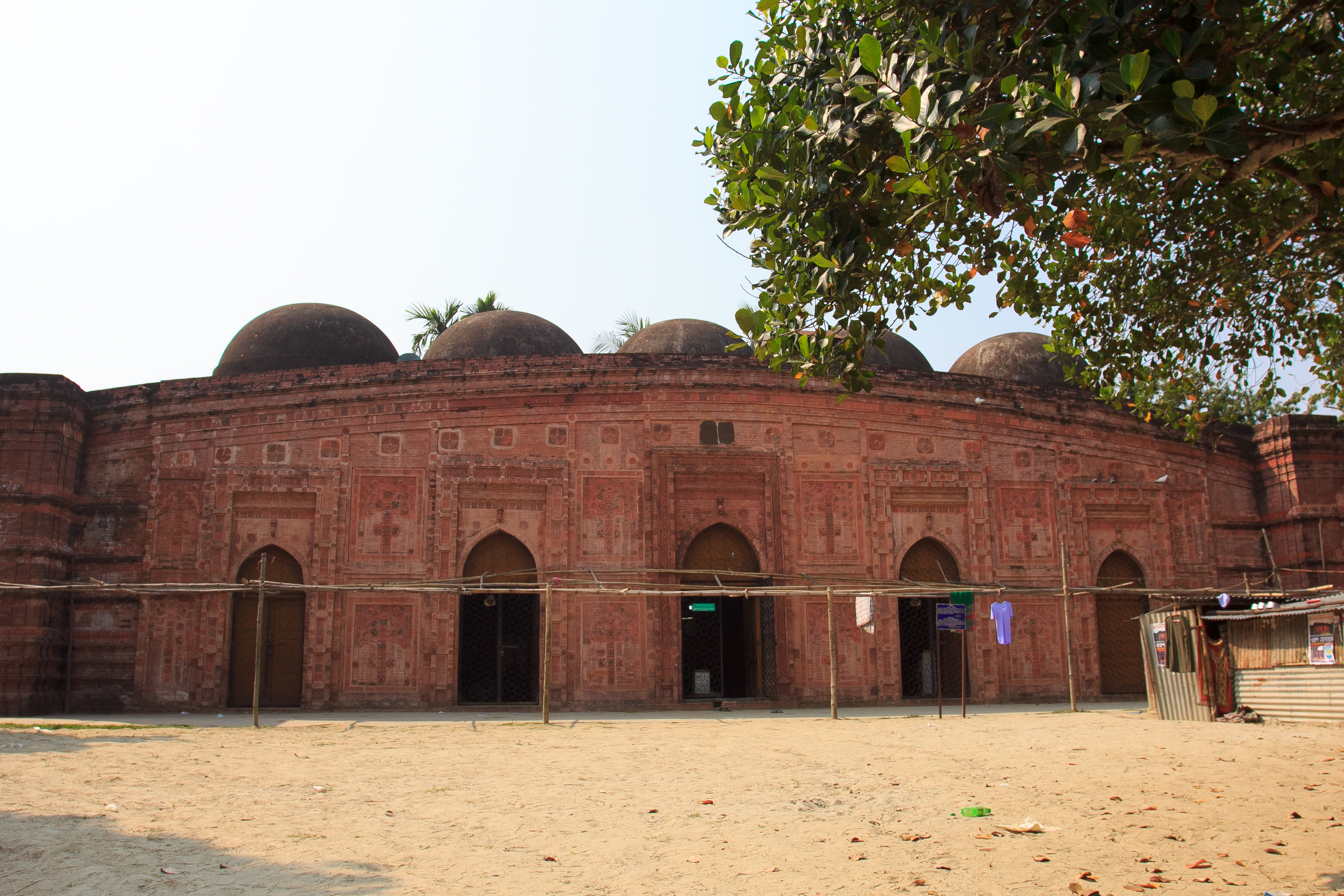 পাতরাইল মসজিদ